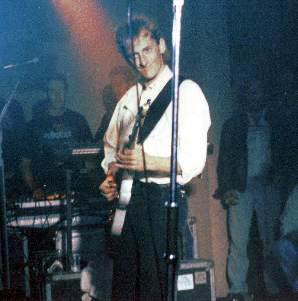 Hugo de Bruin met the Time Bandits in 1987